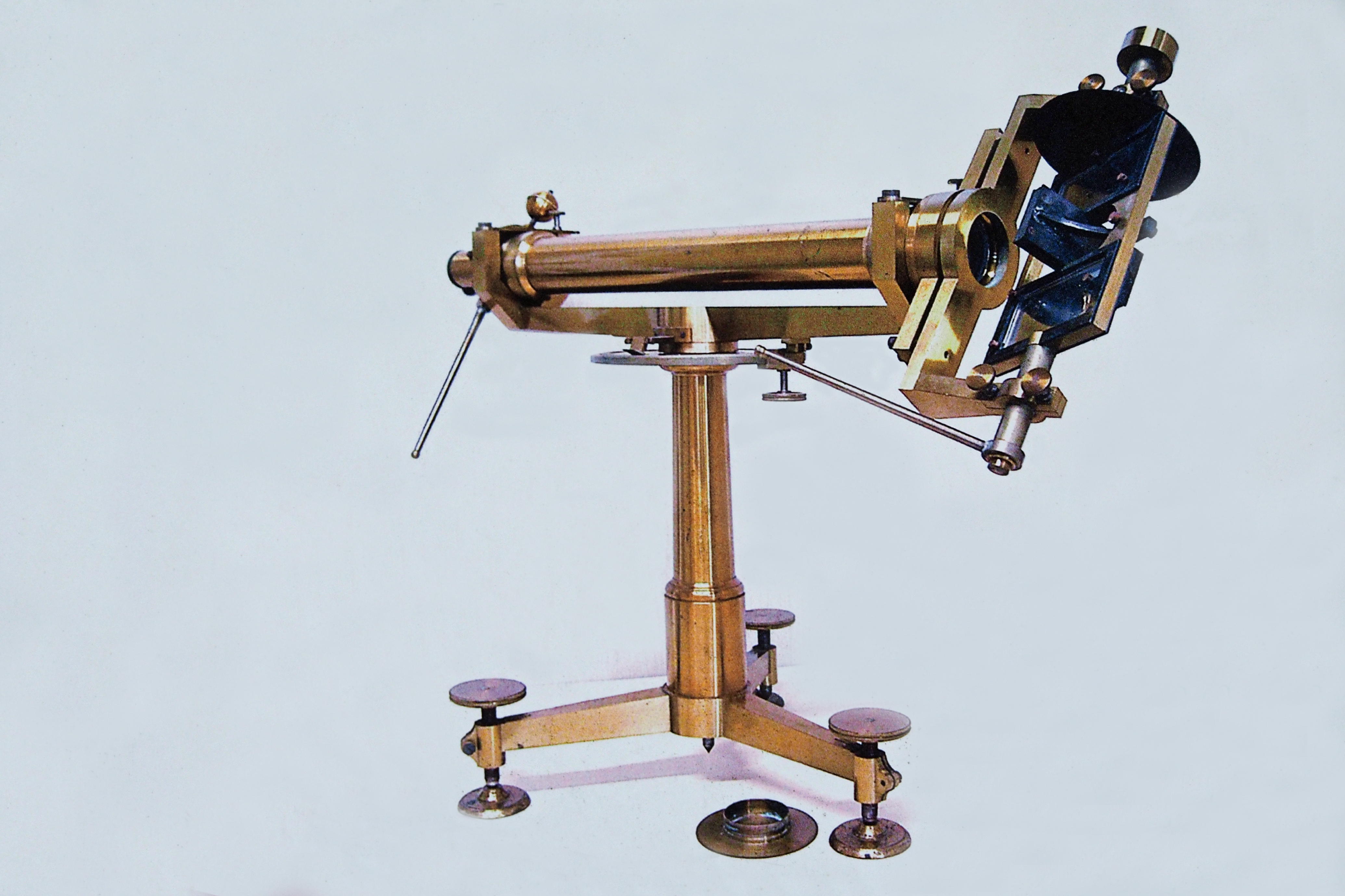 Das von Carl Friedrich Gauß benutzte Heliotrop (Aufnahme aus öffentlicher Infotafel am Haußelberg, Landkreis Celle)